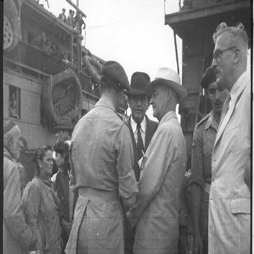 חברי ועדת אונסק"ופ מבקרים בנמל חיפה, ( 18.7.1947) , יושב ראש הועדה, הנציג השבדי סנדסטרום, והנציג היוגוסלבי סימיץ' , בשיחה עם קצין בכיר מהצבא הבריטי, ברקע אניית המעפילים " אקסודוס" . יתכן מאד כי מדובר באניית הגירוש runnymede park